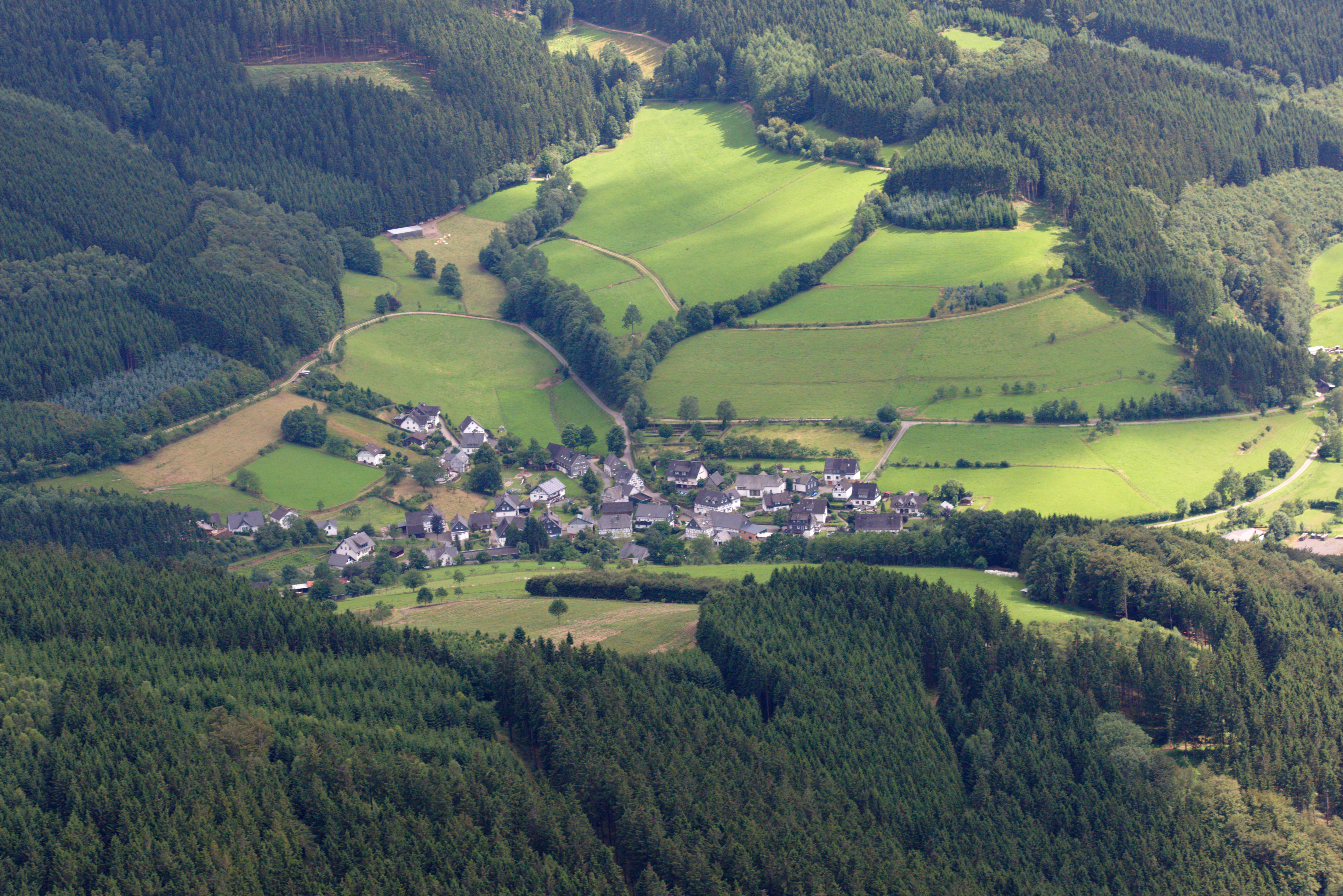 Milchenbach, Blick Richtung Süden